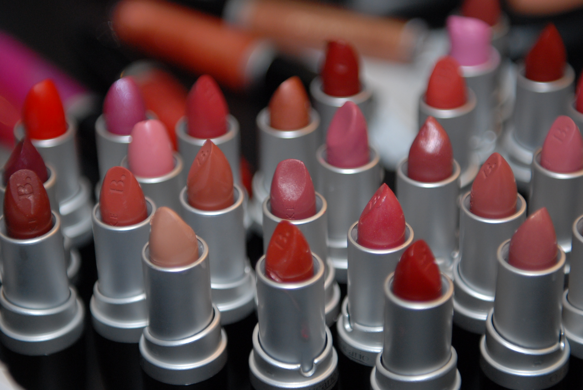 Foto: Marcos Madi